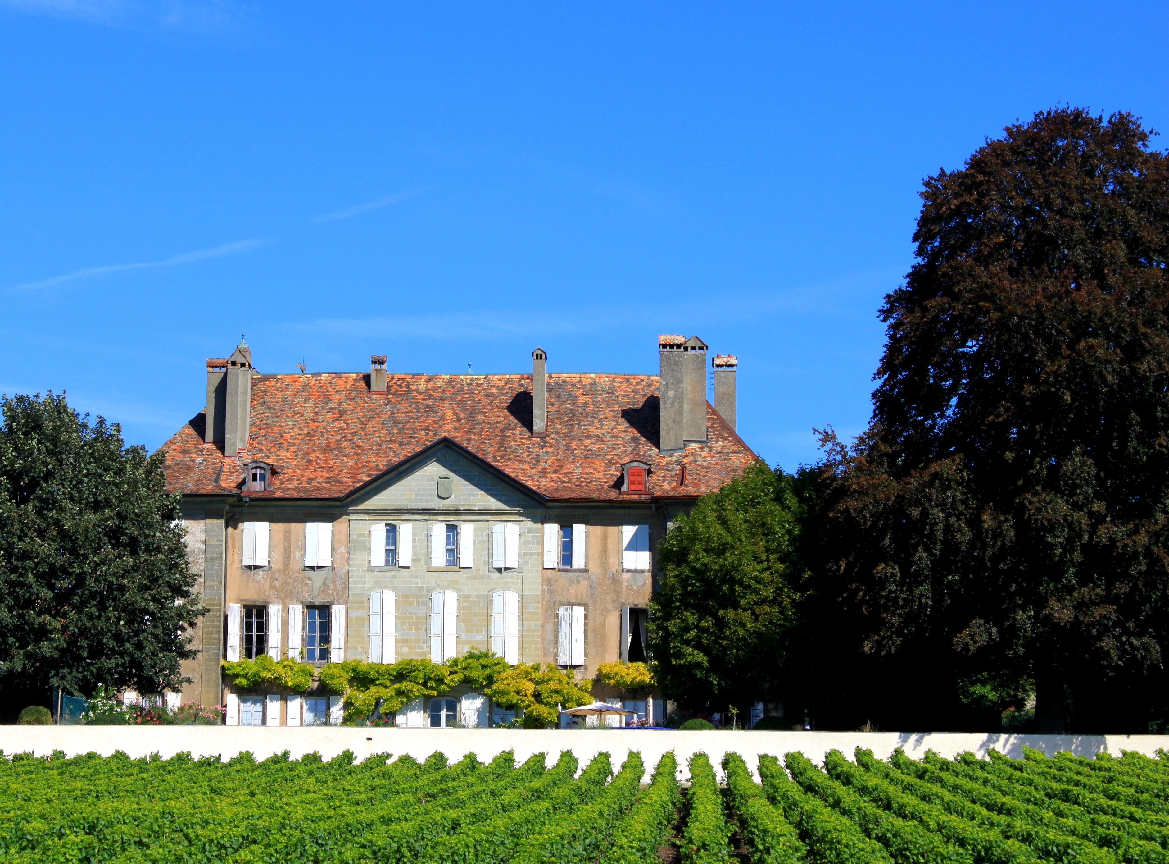 Suisse, canton de Vaud, Saint-Saphorin-sur-Morges, Château de Mestral.